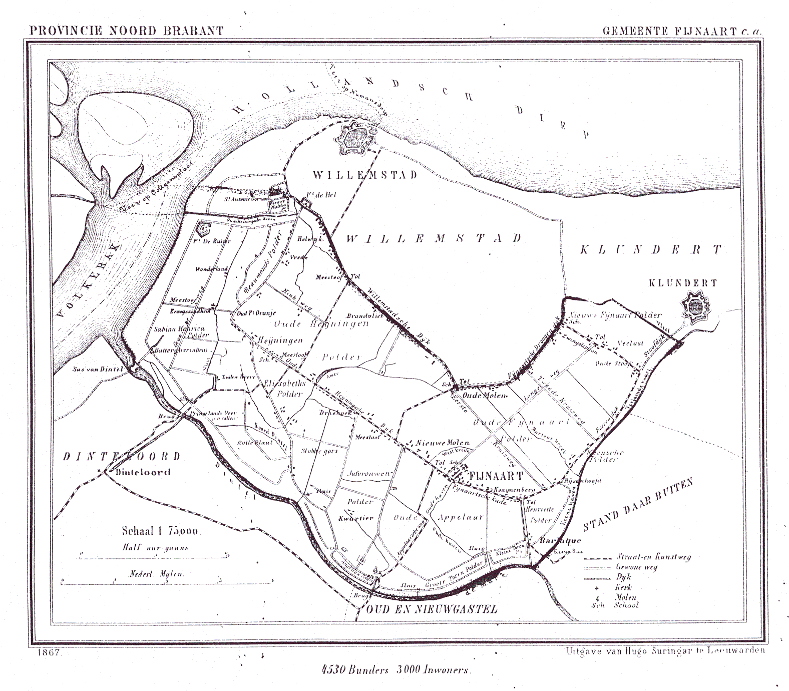 Nederland, Noord-Brabant, Gemeente Fijnaart